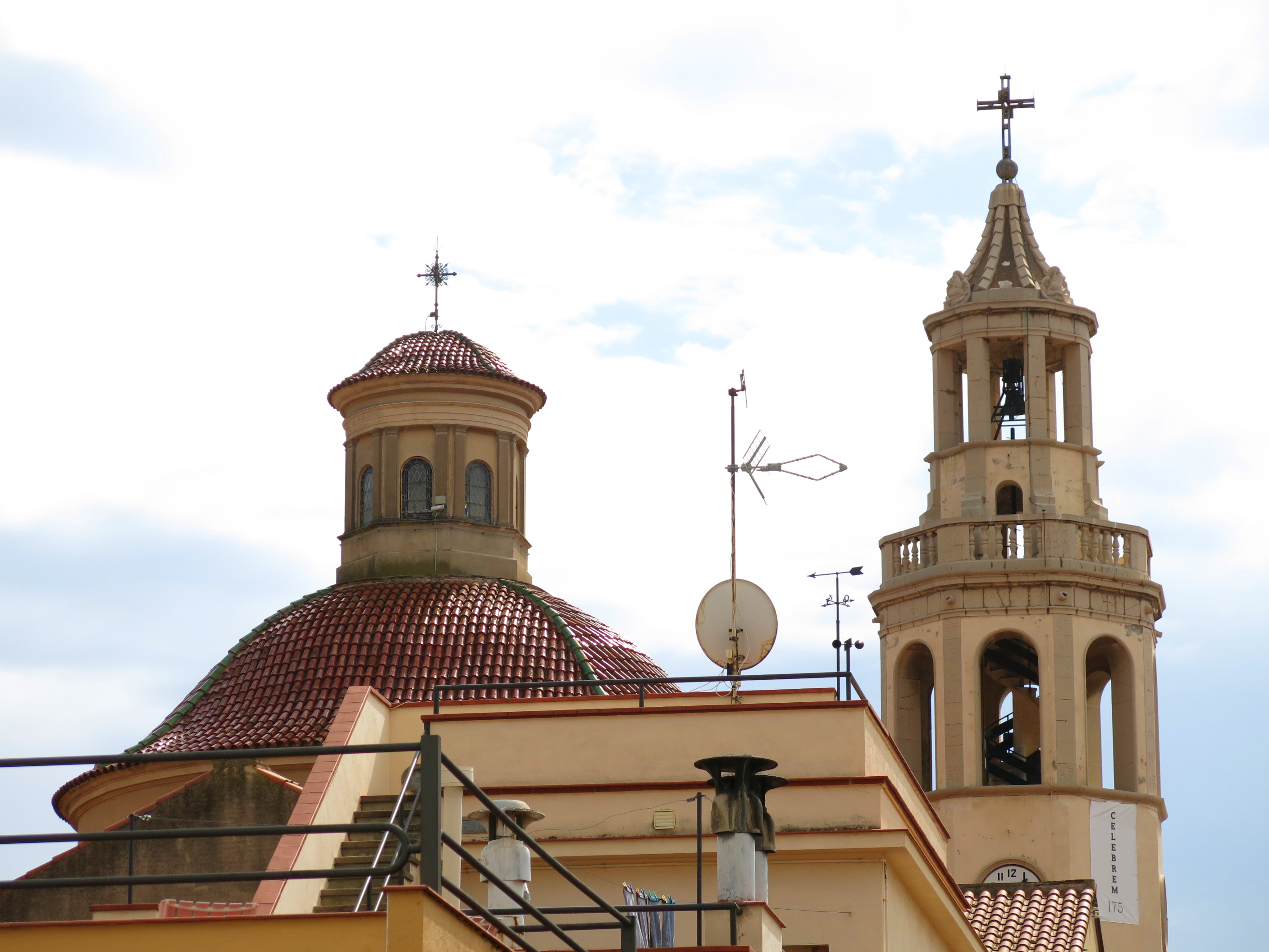 Església parroquial de Sant Cristòfol de Premià (Premià de Mar)